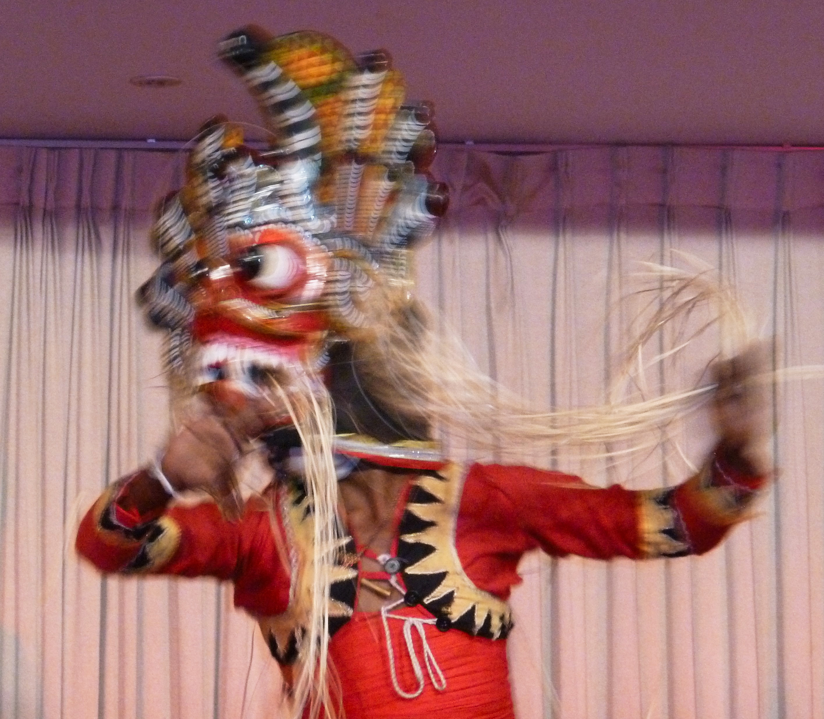 Oak- Ray Kadyan Dance à Kandy Sri Lanka.- Asie du Sud